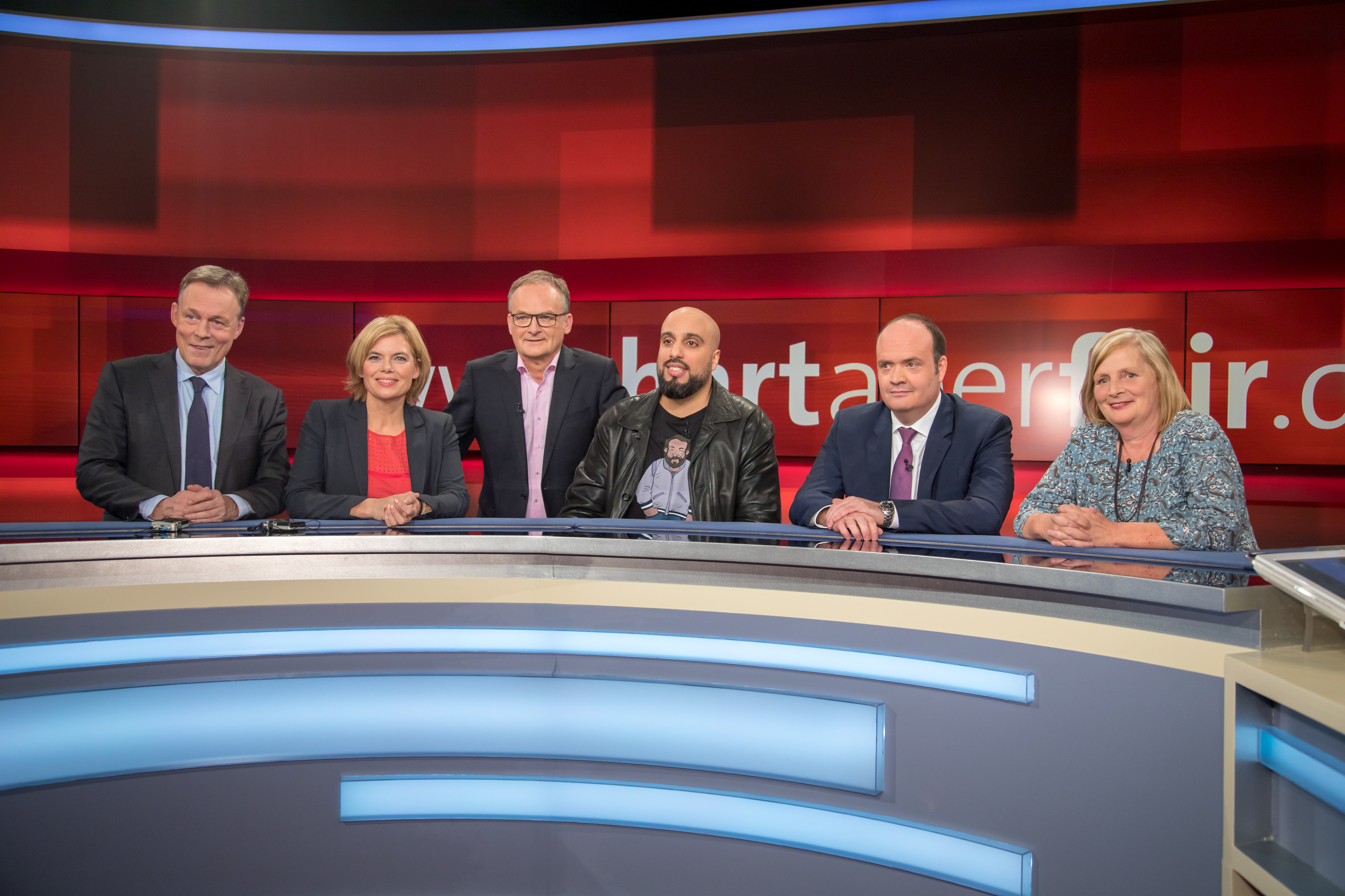 Thomas Oppermann, Julia Klöckner, Frank Plasberg, Abdelkarim, Robin Alexander und Bettina Gaus in der WDR-Sendung "hart aber fair" am 18.12.2017